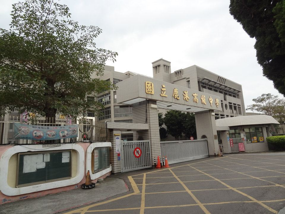 中文（台灣）: 國立鹿港高級中學，位於彰化縣鹿港鎮中山路661號。